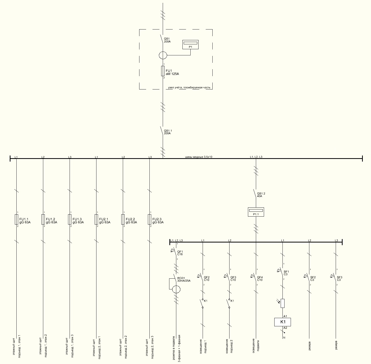 однолинейная схема ВРУ жилого дома